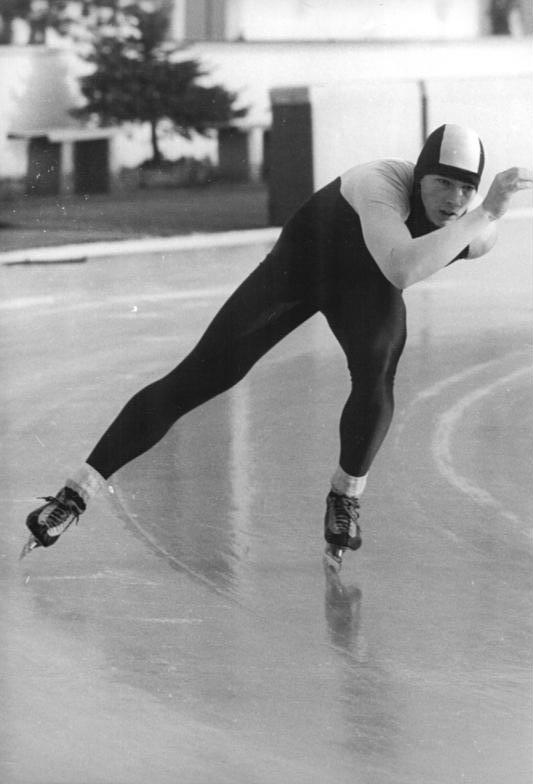 Uwe-Jens Mey ADN-ZB Thieme 15.3.86 Karl-Marx-Stadt: DDR-Sprintmeisterschaften im Eisschnellauf-Mit einem Sieg über 500m und einem zweiten Rang über die 1000-m-Distanz setzte sich der favorisiete Berliner Dynamo-Spritner Uwe-Jens Mey (Foto von den DDR-Meisterschaften 1985 in Karl-Marx-Stadt) nach dem ersten Tag der Titelkämpfe an die Spitez der Konkurrenz.